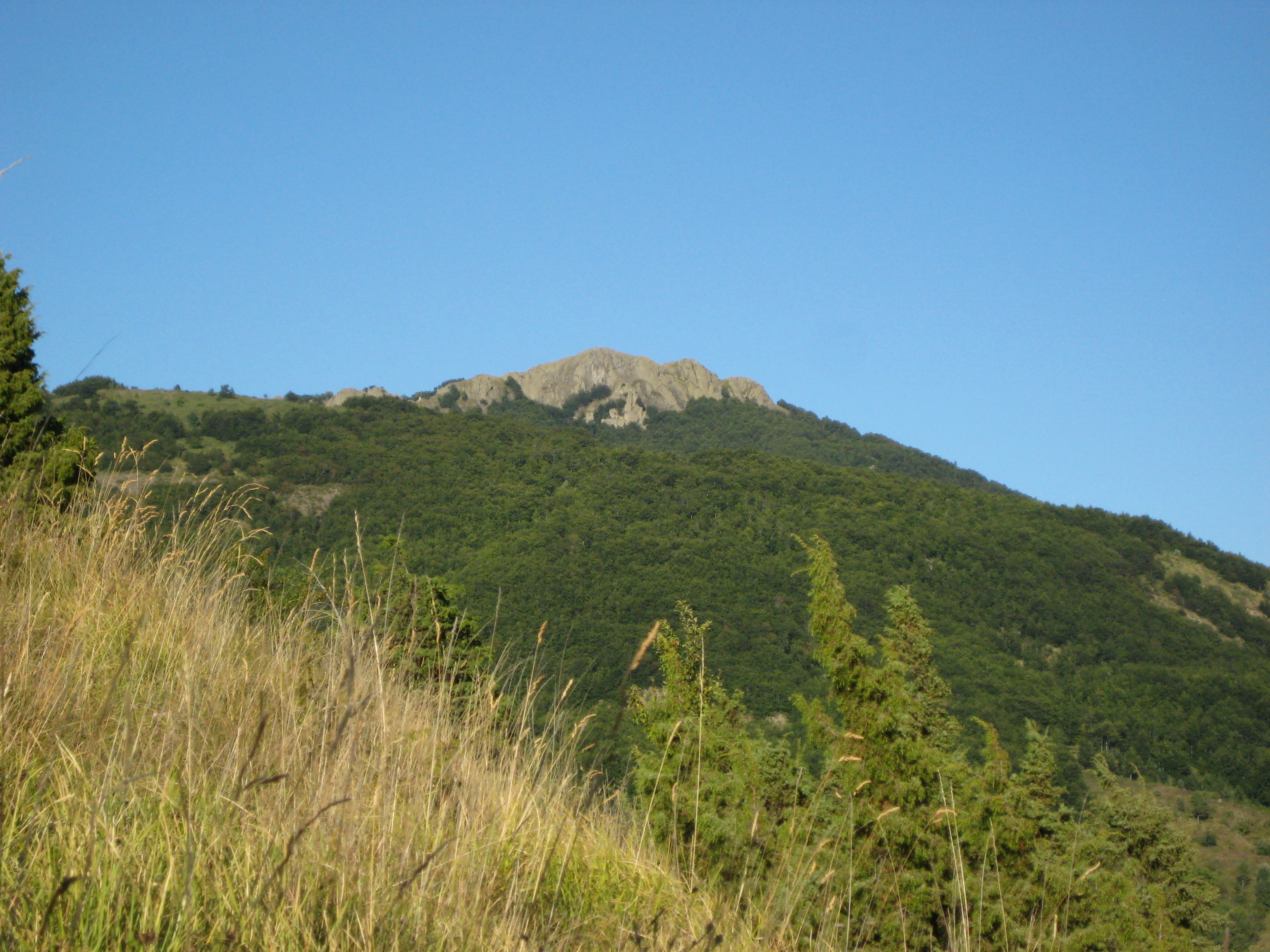 Foto: Monte Tomarlo in estate Autore: Franco Luigi Mazza Proprietà: Franco Luigi Mazza